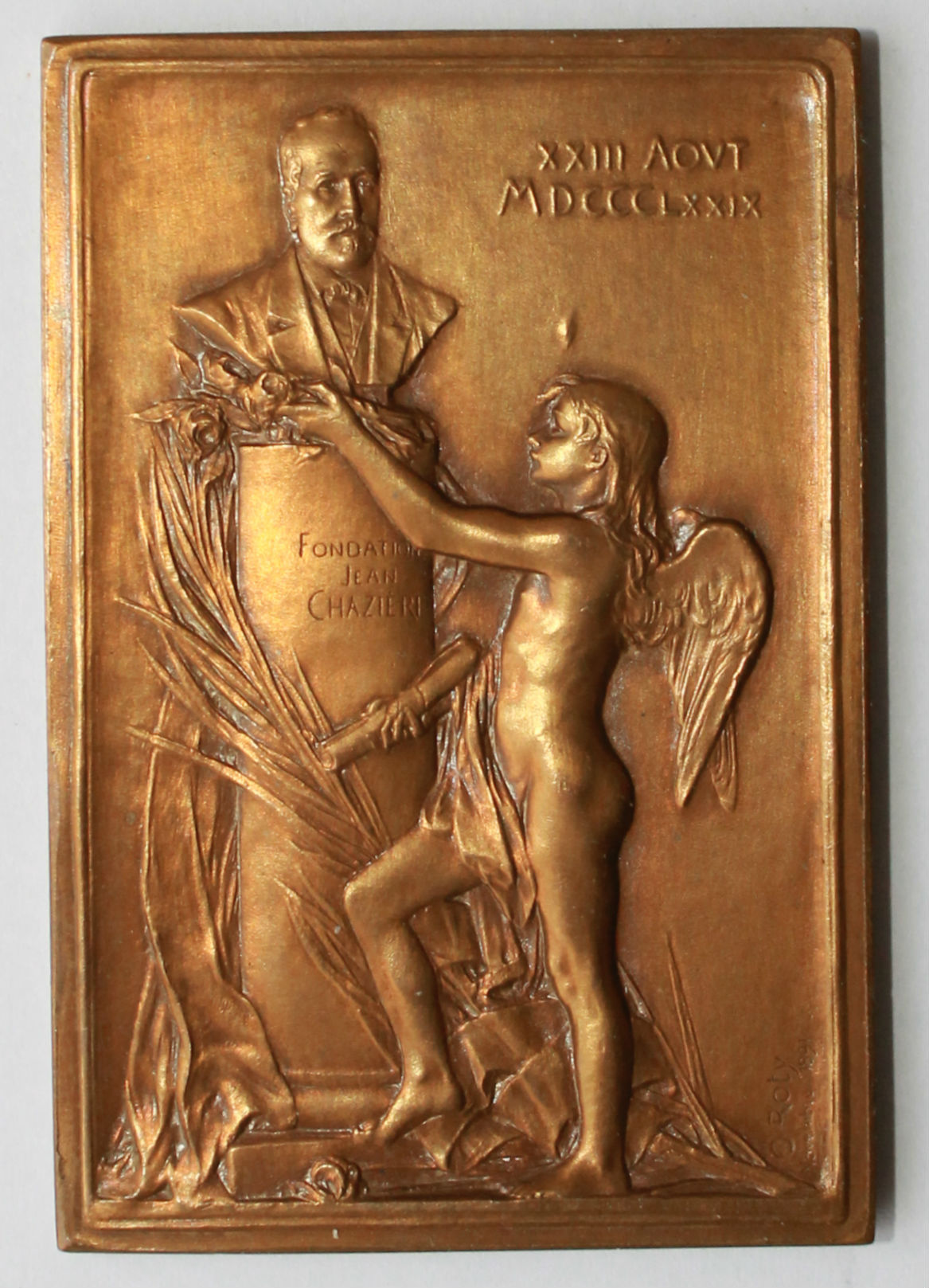 Plaquette (63x42mm) par Oscar Roty La fondation Chazière est due à la générosité du lyonnais Jean Chazière, qui a légué par testament du 23 août 1879 à l'Académie des sciences, belles-lettres et arts de Lyon la somme de 230 mille francs. L'Académie devait, avec les revenus de la somme léguée, encourager les sciences, l'histoire, la littérature, les beaux-arts, la poésie et l'archéologie et récompenser les actes remarquables de vertu et d’héroïsme.